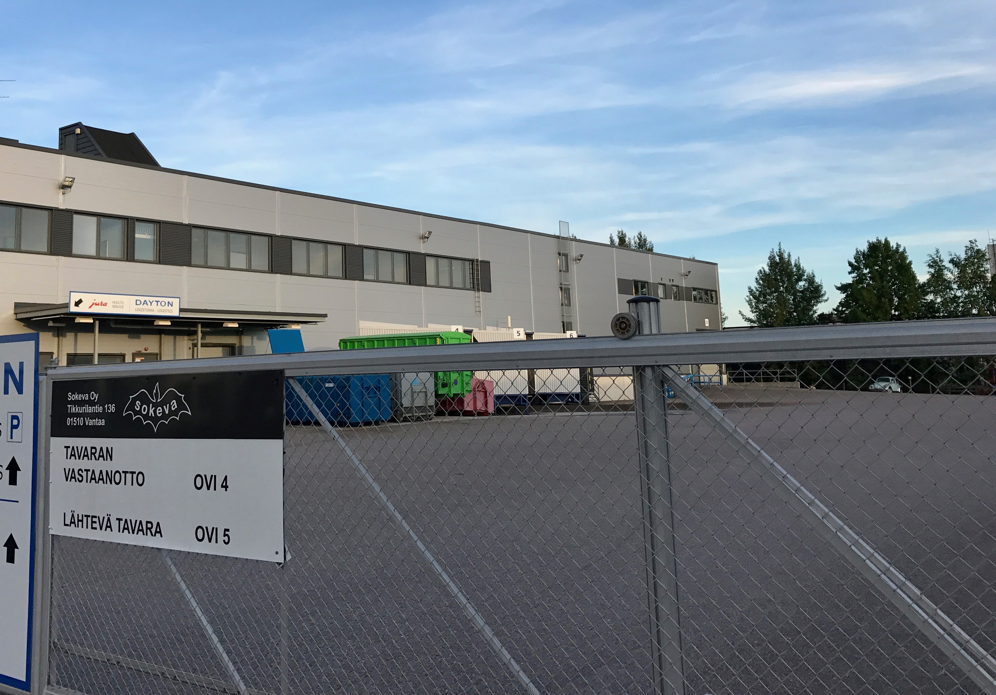 Sokevan pääkonttori ja varasto Vantaan Tikkurilantiellä.